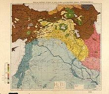 მაუნსელის რუქა, წინა მსოფლიო ომის პირველი ბრიტანული ეთნოგრაფიული რუკა ნაყოფიერი ნახევარმთვარის არეალში